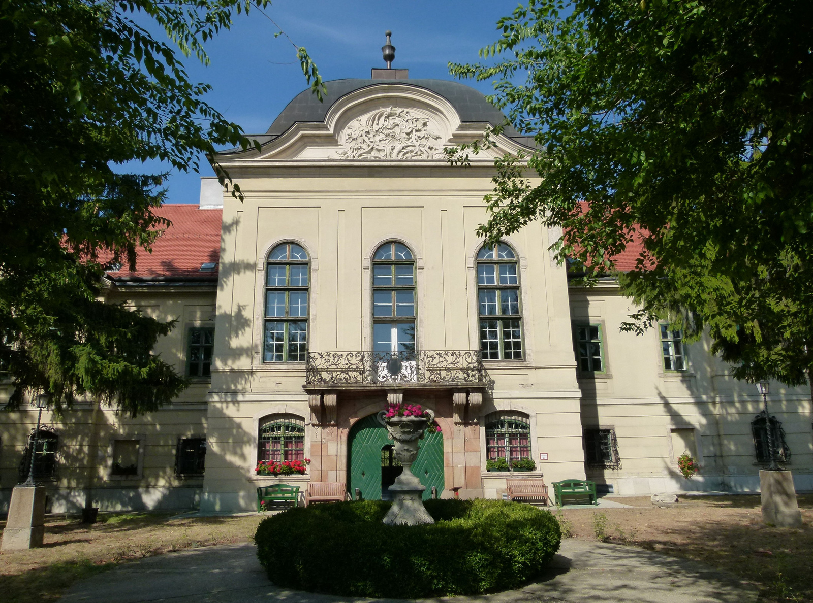 Ráday-kastély (Pécel, Kálvin tér 1.) This is a photo of a monument in Hungary, Identifier: 7216